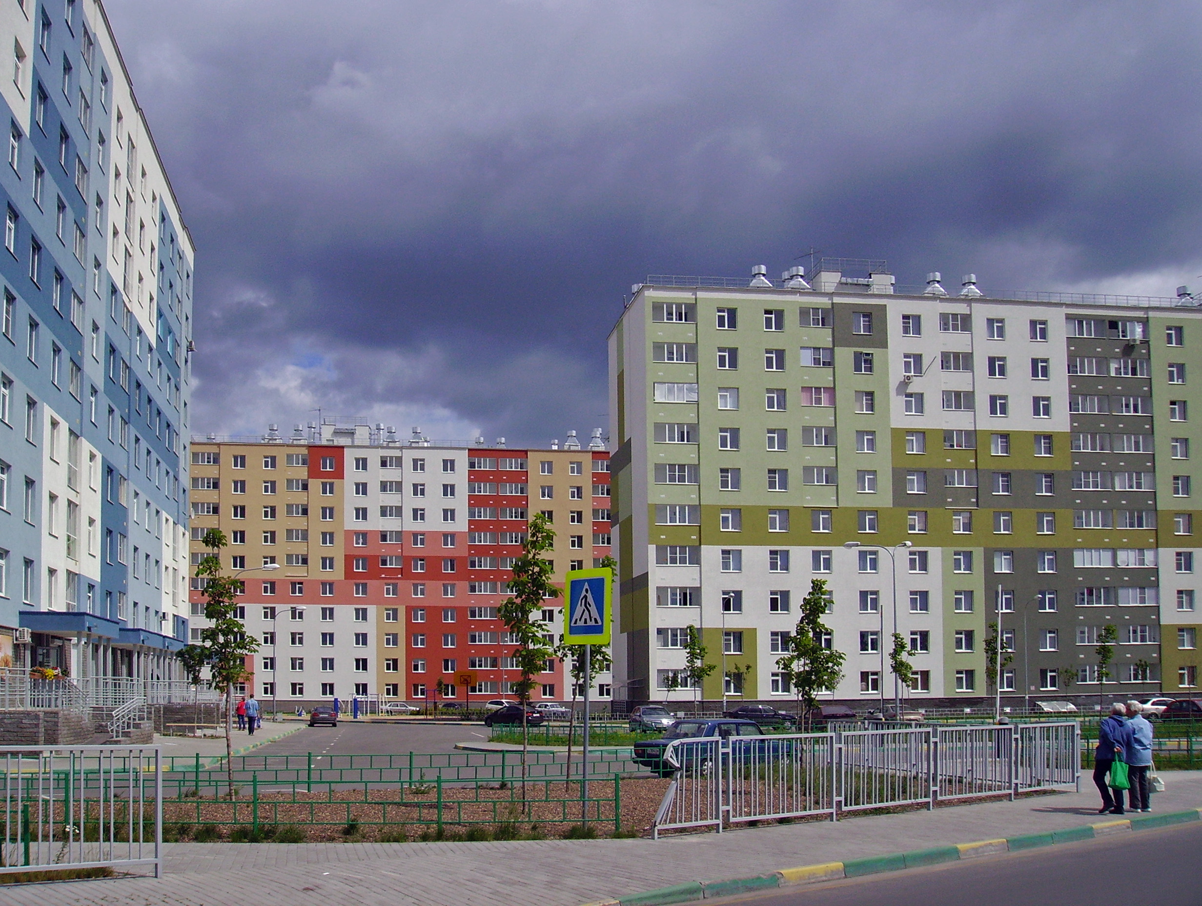 Нижний Новгород. Микрорайон Юг в Автозаводском районе.